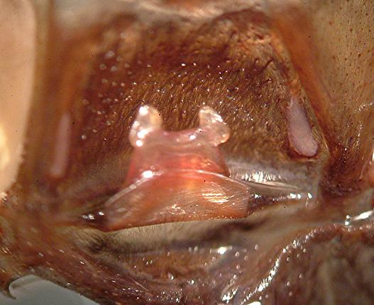 selbstfotografiert, Spermathek der A. geniculat Vergrößerung mittels Binokular